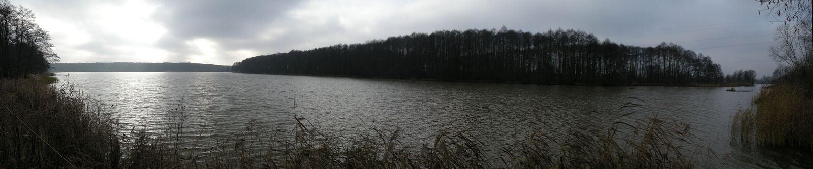 Jezioro Portowe, Szczecin